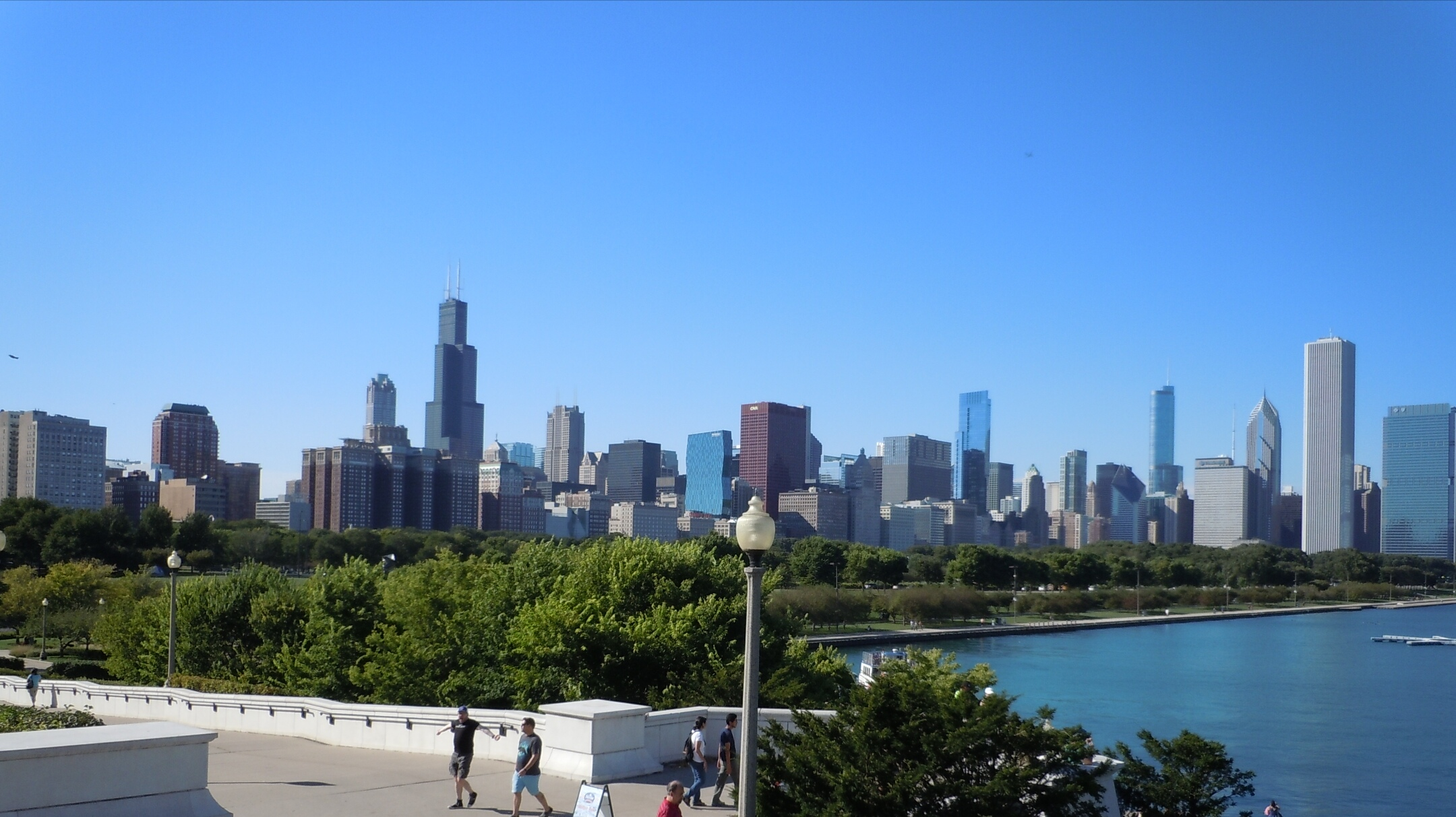 Skyline Chicago City Illinois